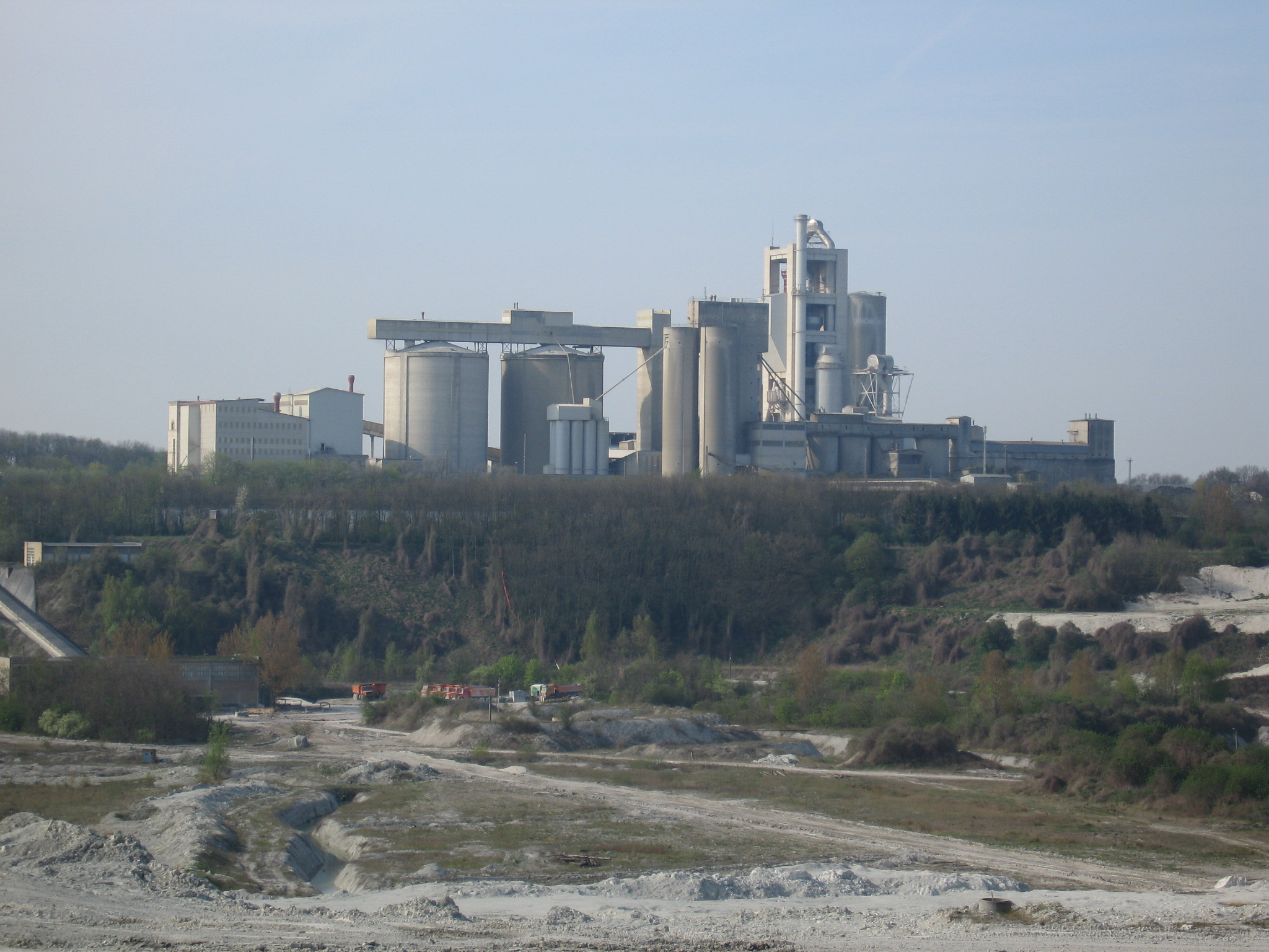 Die Teutonia-Zementfabrik in Hannover-Misburg vor einer ihrer Mergelgruben, aufgenommen aus nord-nord-östlicher Richtung